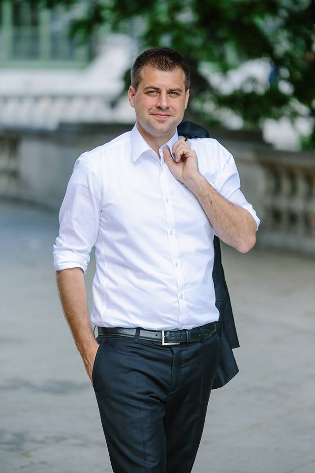 Michael Pock, Nationalratsabgeordneter NEOS